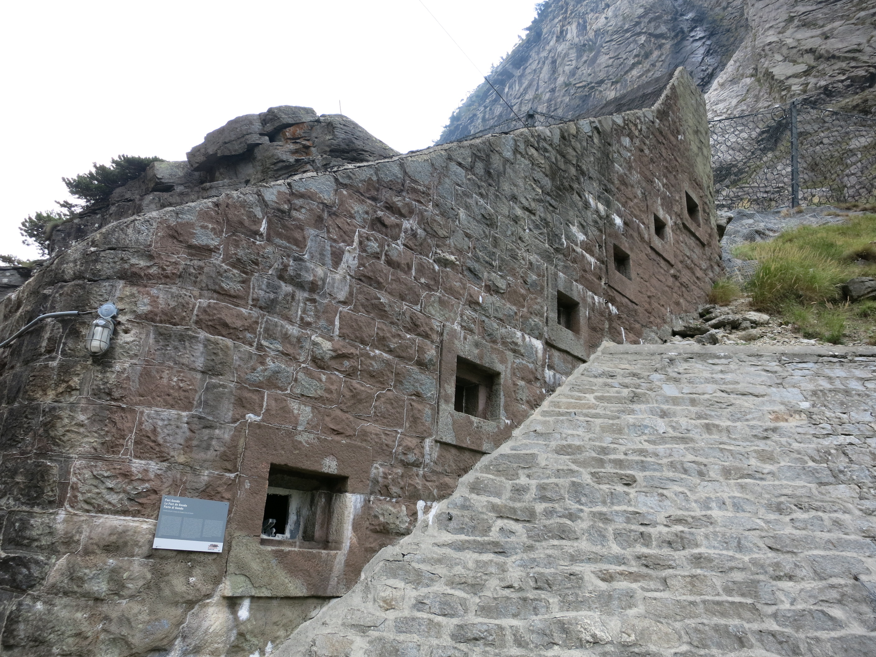 Sperrstelle Simplonachse VS, Schweiz